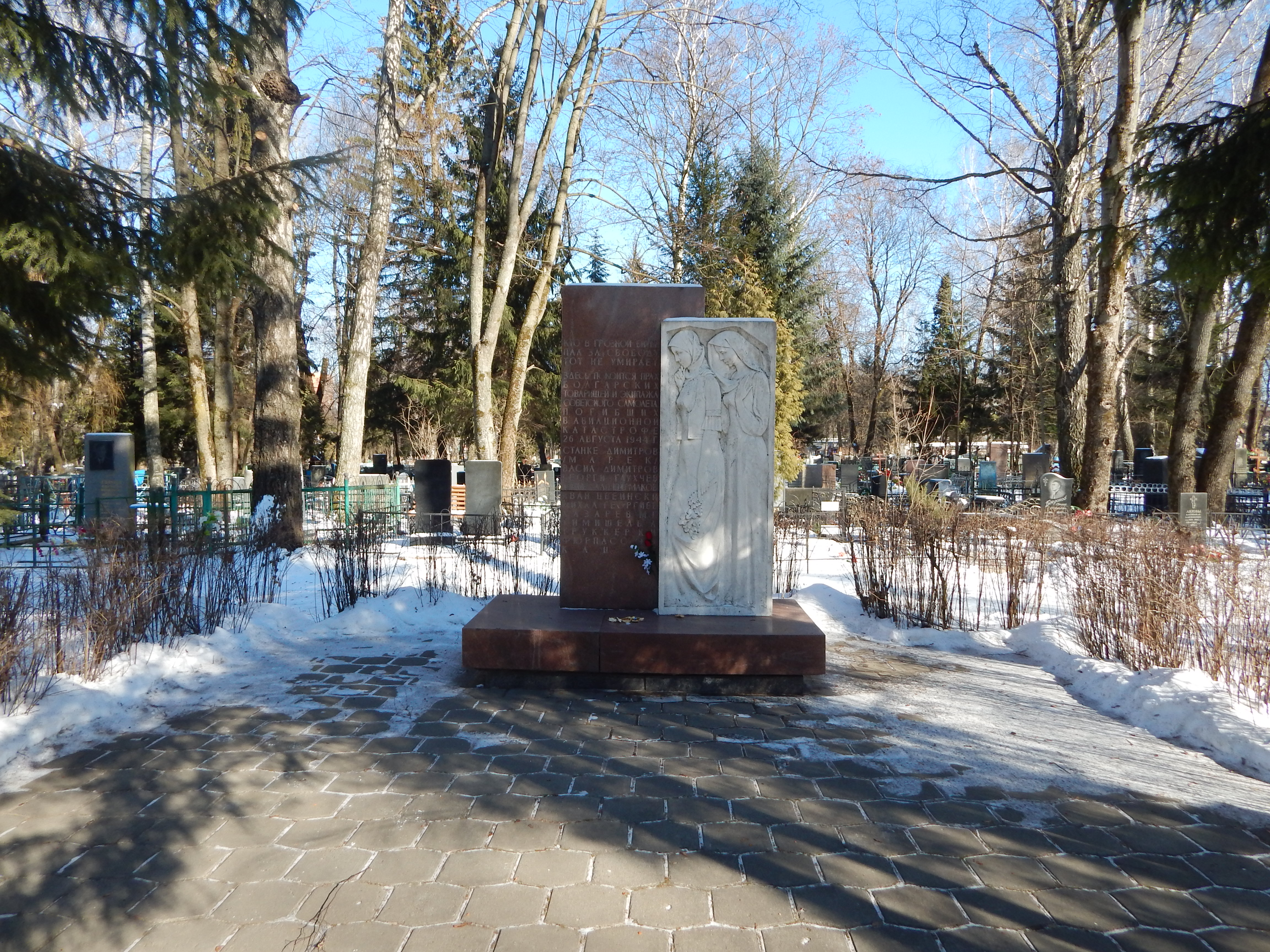 Болгарские патриоты